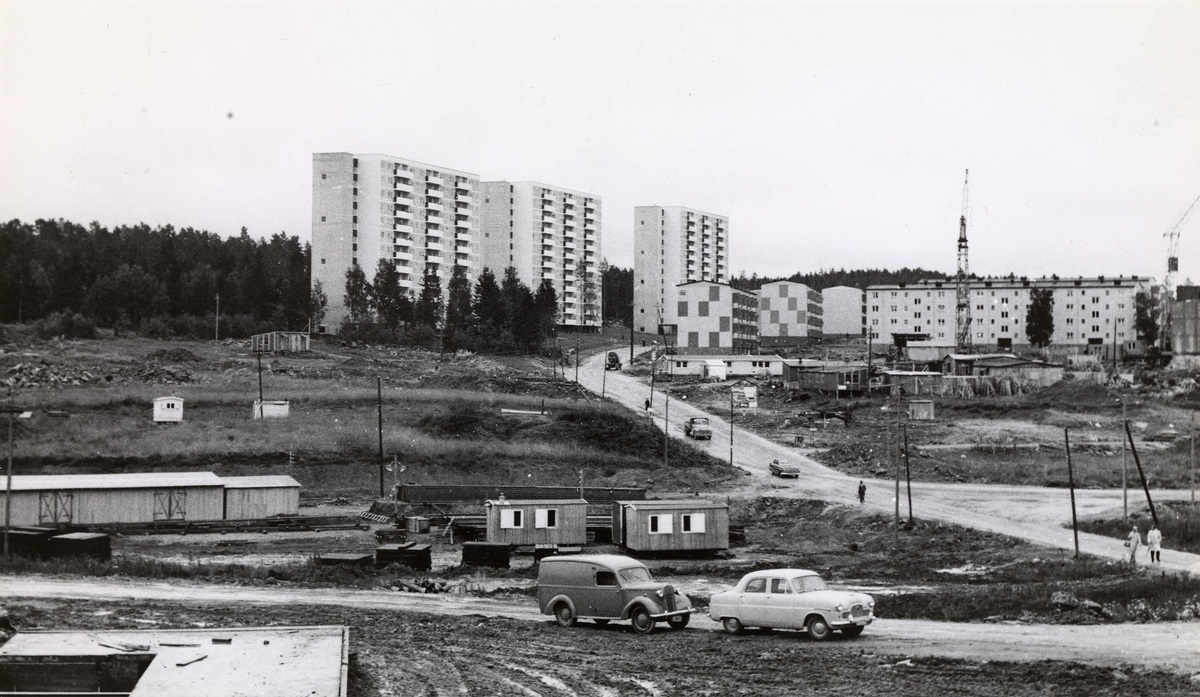 Fra byggingen av blokkbebyggelsen på nedre Bøler.